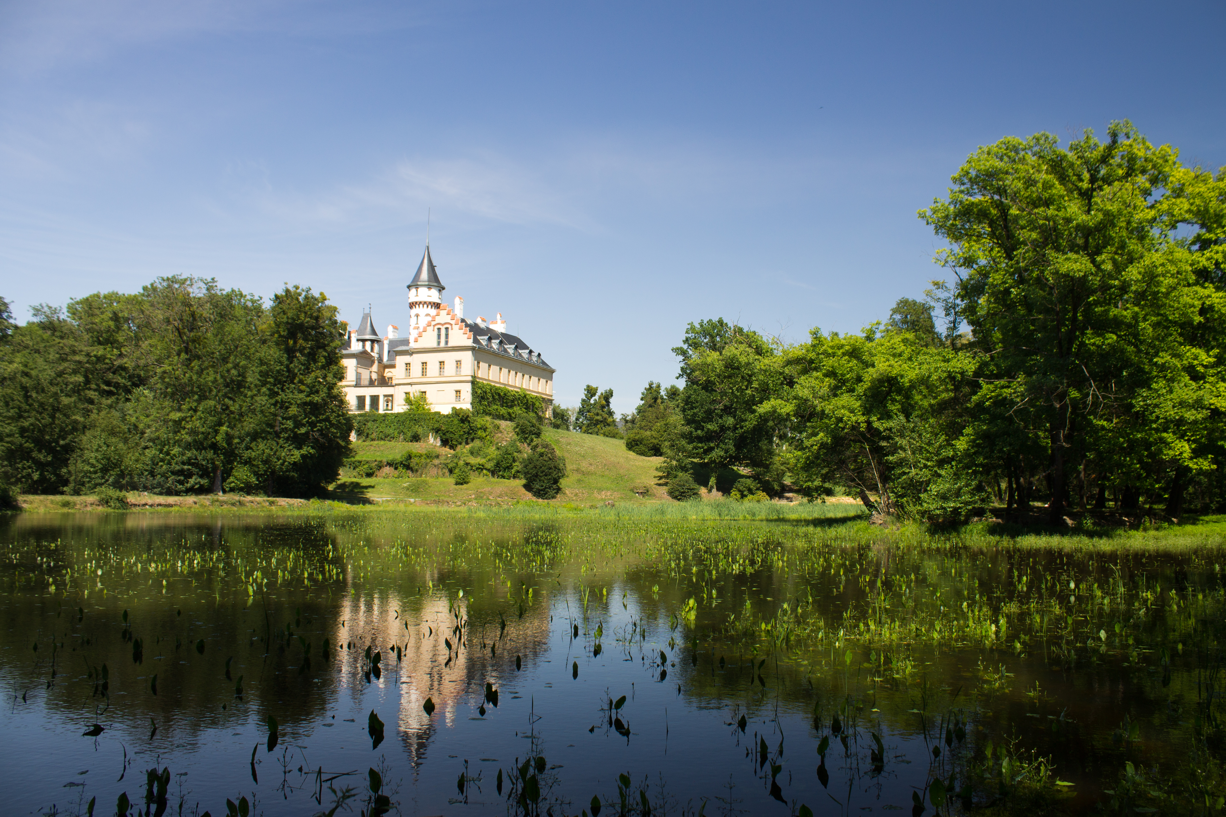 Zámek Raduň, Zámecká 45, Raduň